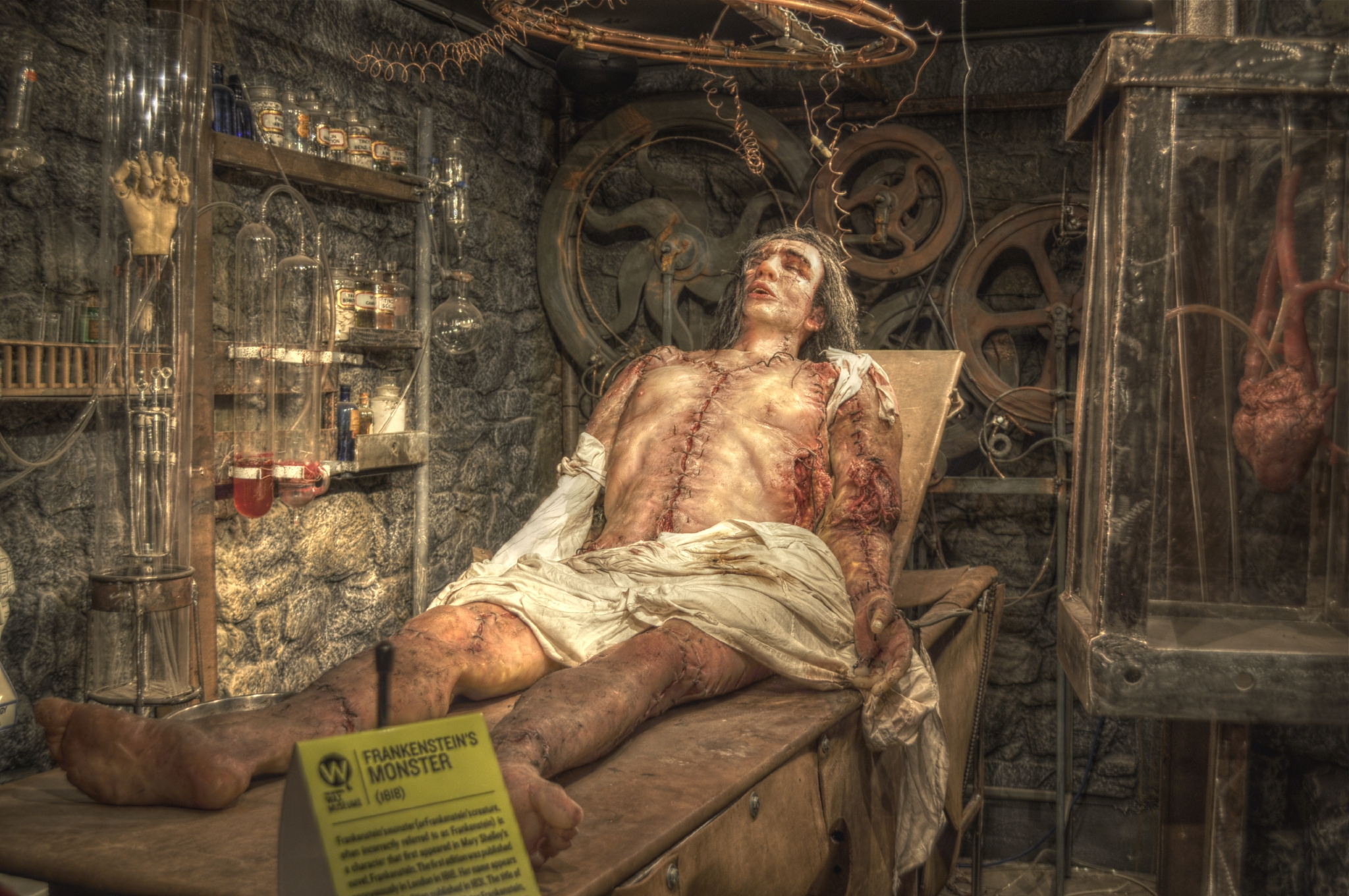 Camera: Nikon D5000 Luminance HDR, Mantiuk '06